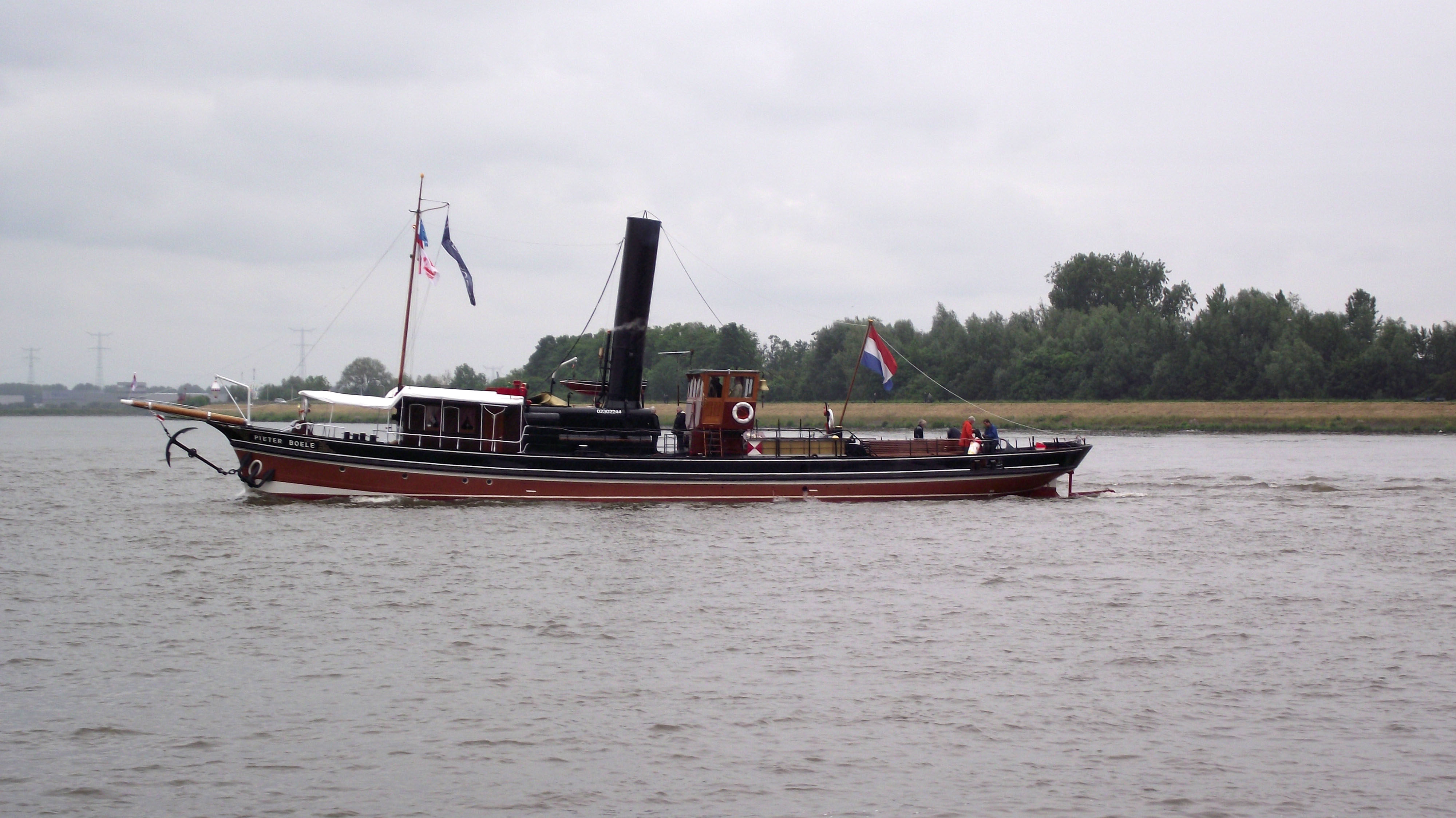 Stoomschip Pieter Boele gebouwd in 1893.